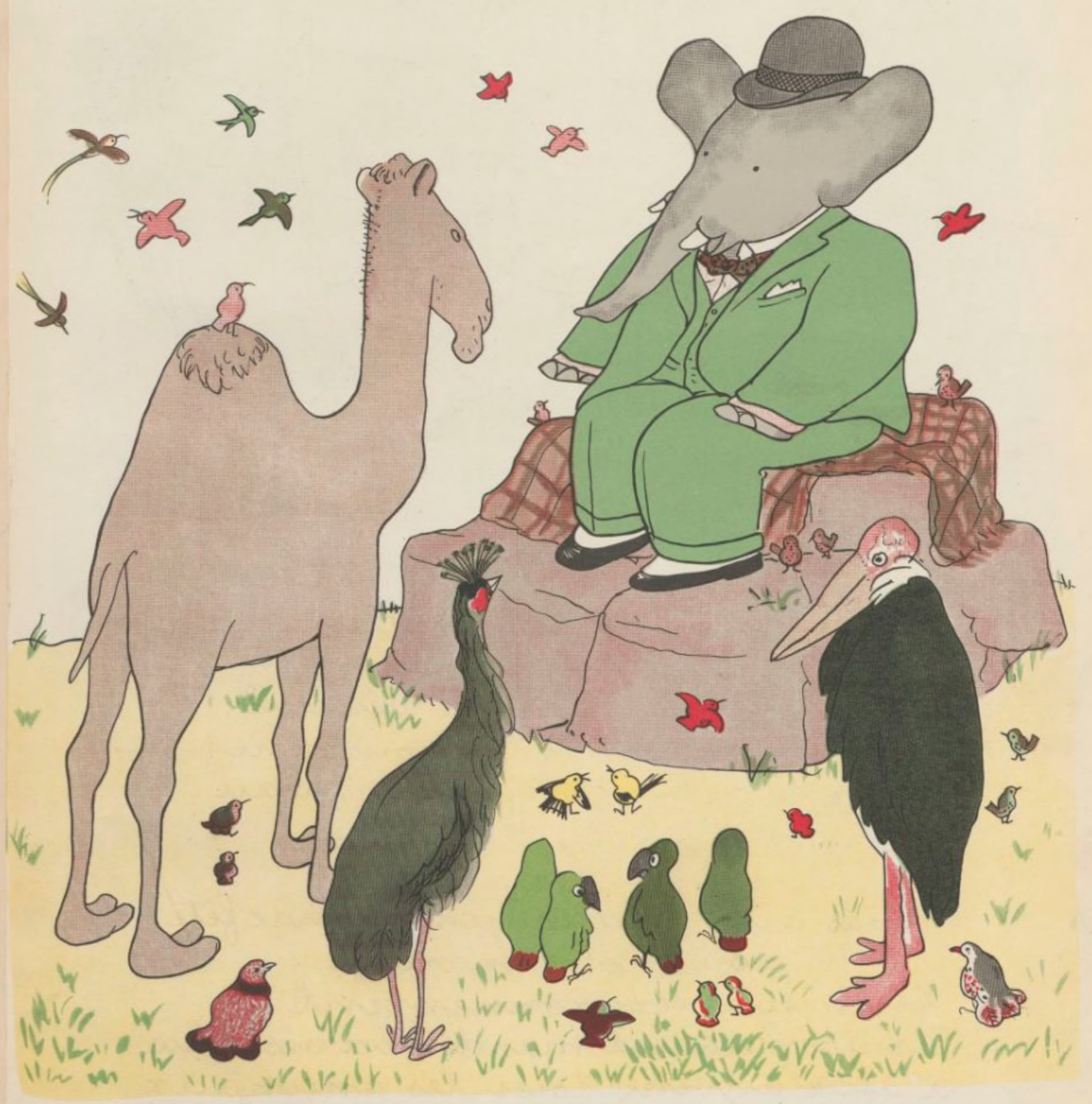 Histoire de Babar : le petit éléphant / Jean de Brunhoff Éditions du Jardin des modes (Paris)